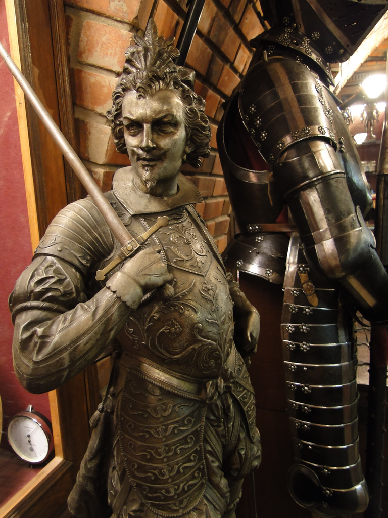 Instituto Brennand/PE